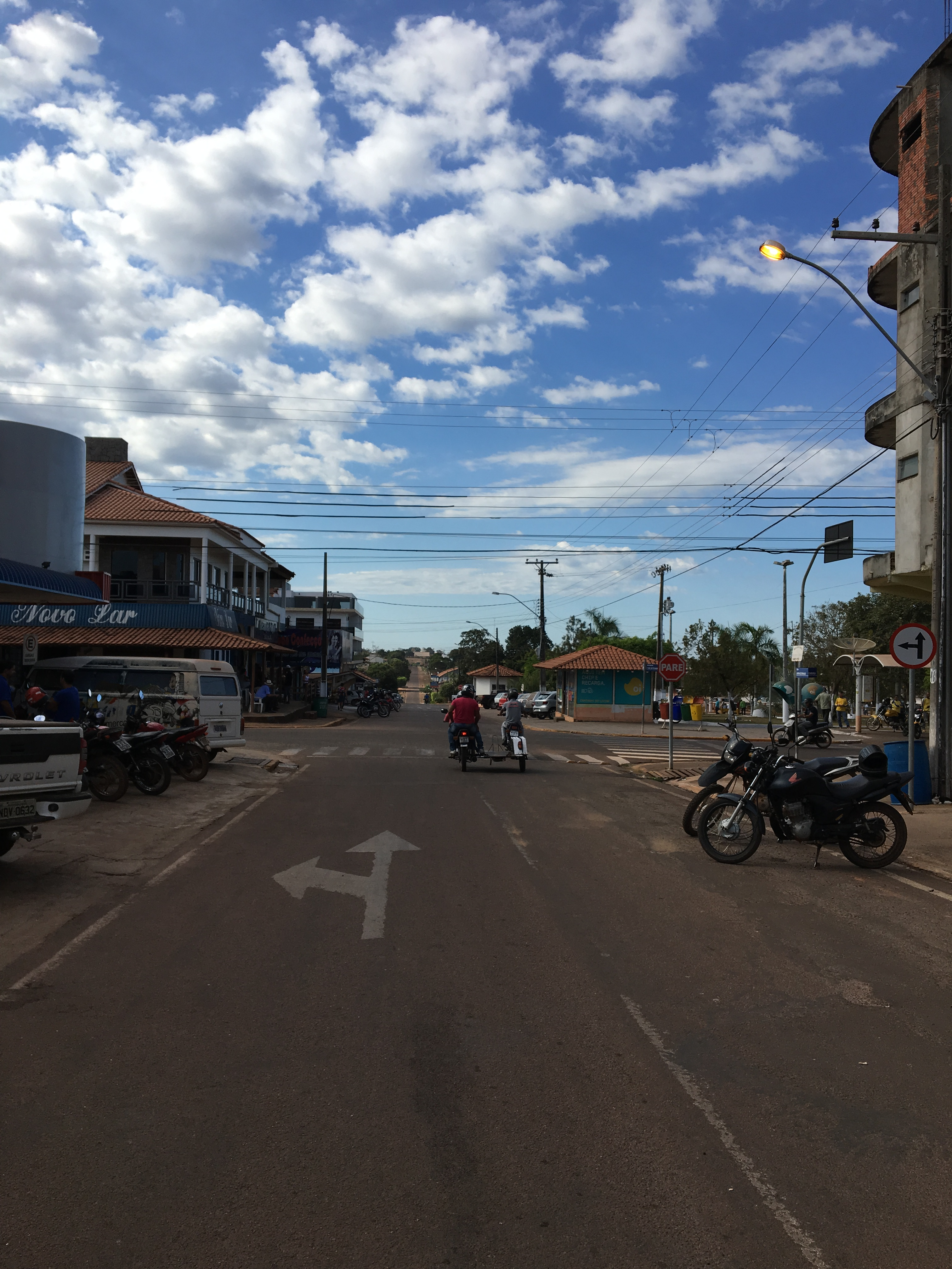 Rua Amazonas, no centro da cidade de Espigão do Oeste, em Rondônia.